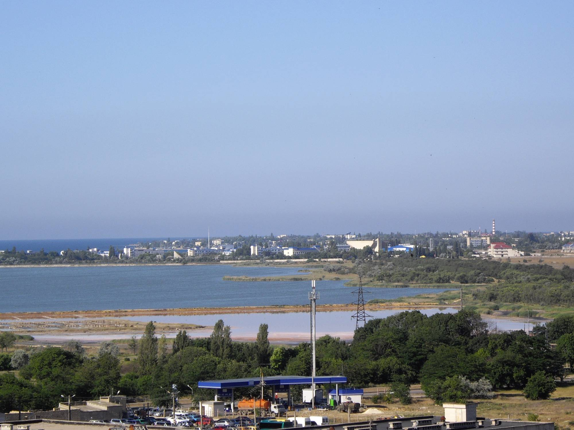 озеро Мойнаки. Общий вид. На заднем фоне Заозерное и Евпаторийский маяк.